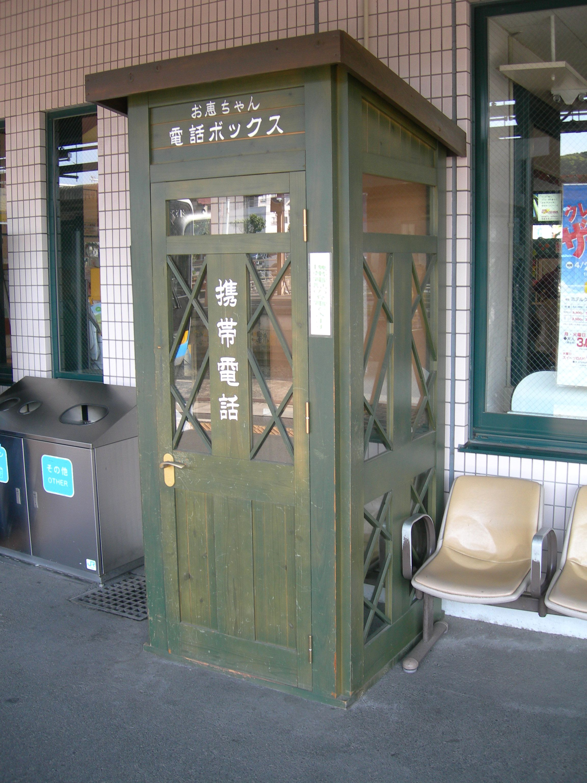 宇和島駅ホームにある「お恵ちゃん電話ボックス」